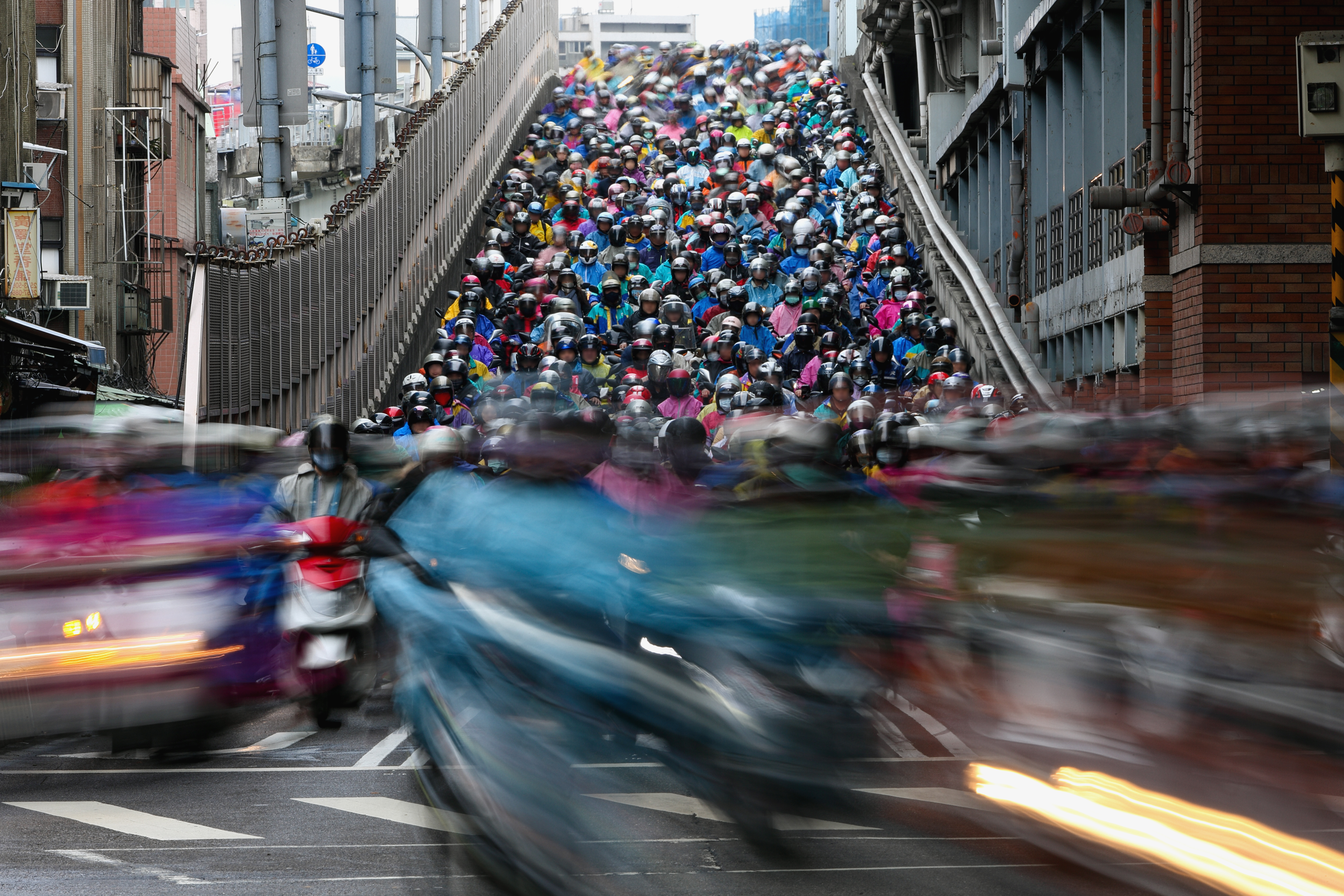 中華民国台北市にある台北大橋東詰で平日朝に撮影された、自動二輪による通勤風景。「バイクの滝（機車瀑布/Motorcycle Waterfall）」と呼ばれることがある。